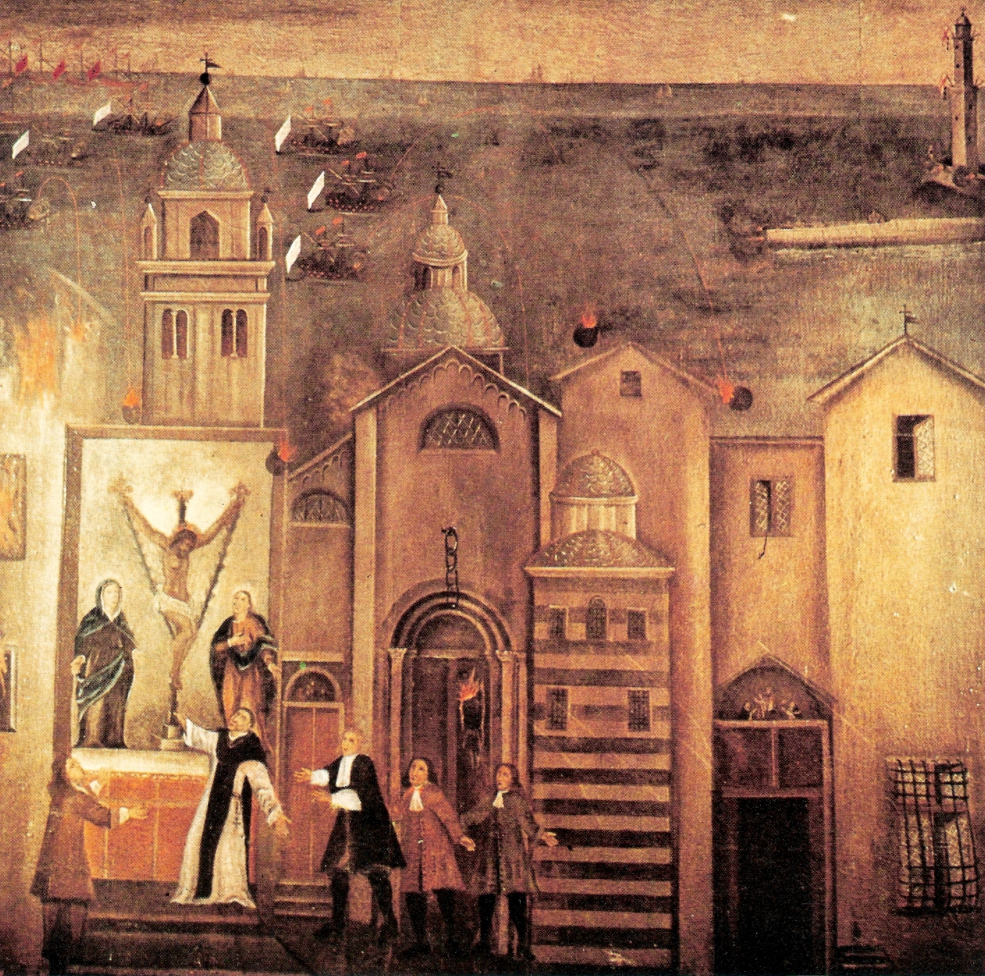 Dipinto raffigurante la chiesa di Santa Maria di Castello nel XVII secolo.